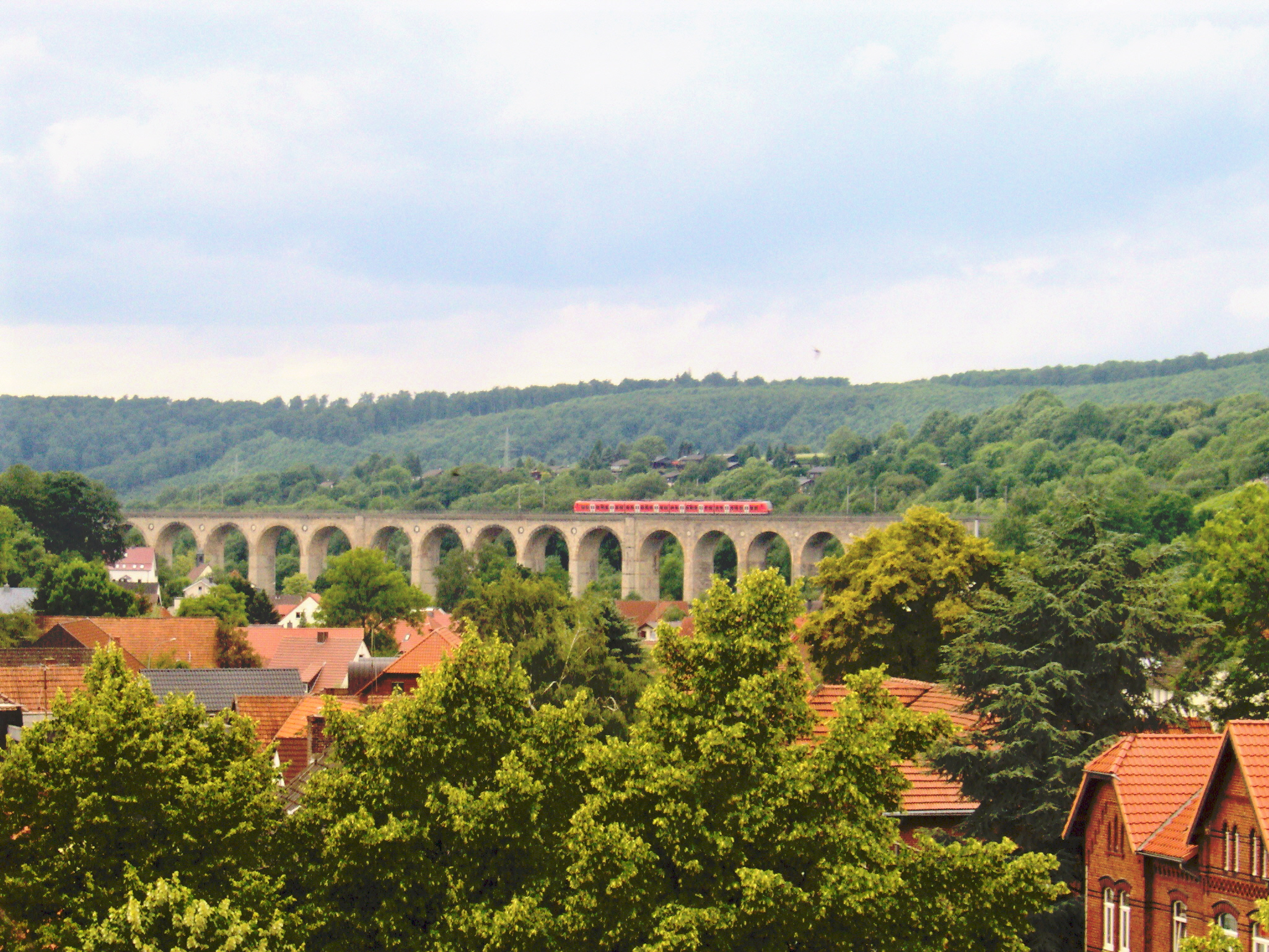 Altenbekener Viadukt, the railway bridge in Altenbeken, Northrhine-Westphalia, Germany